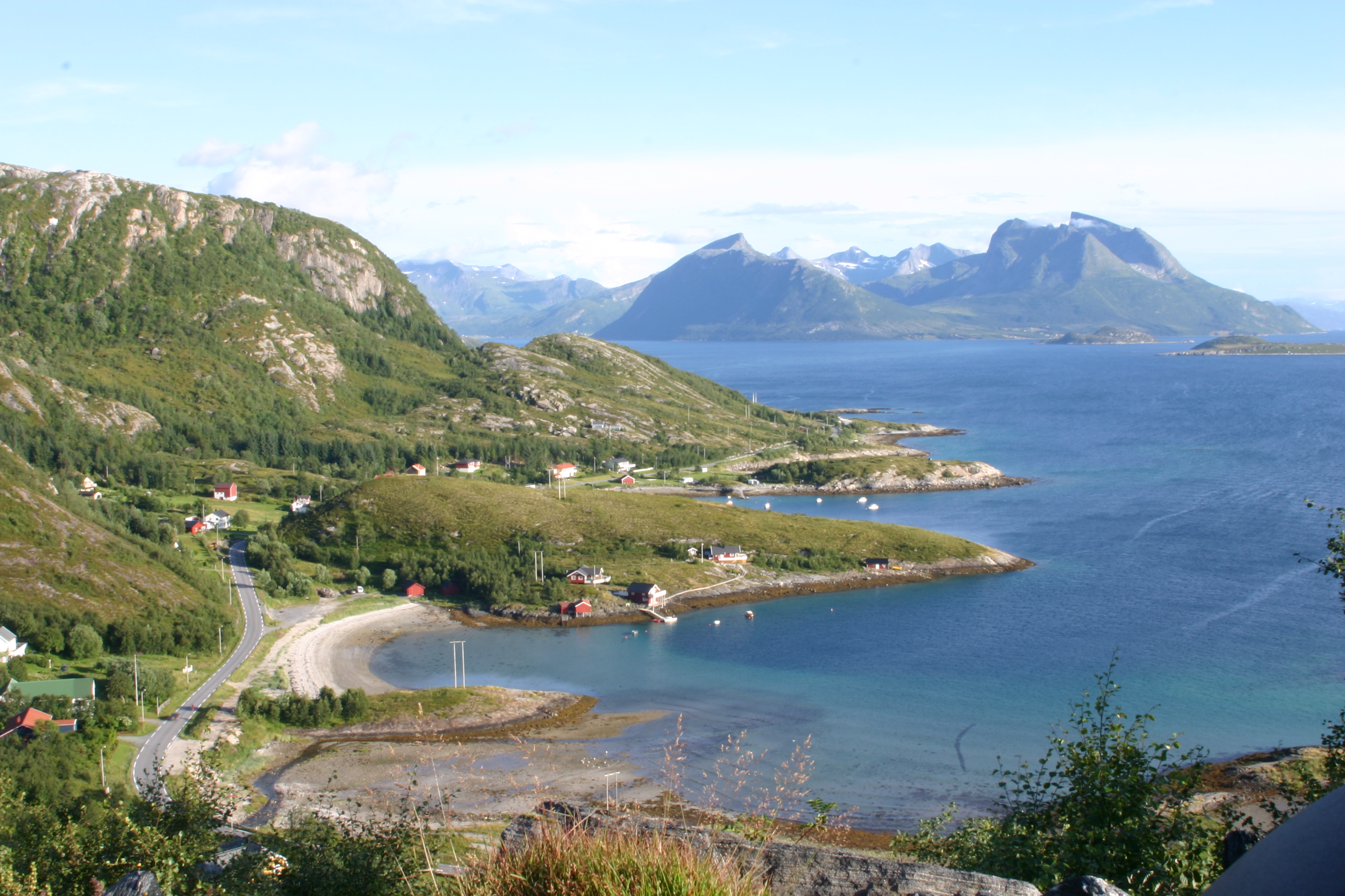 Tonnes i Lurøy, Nordland, Norway